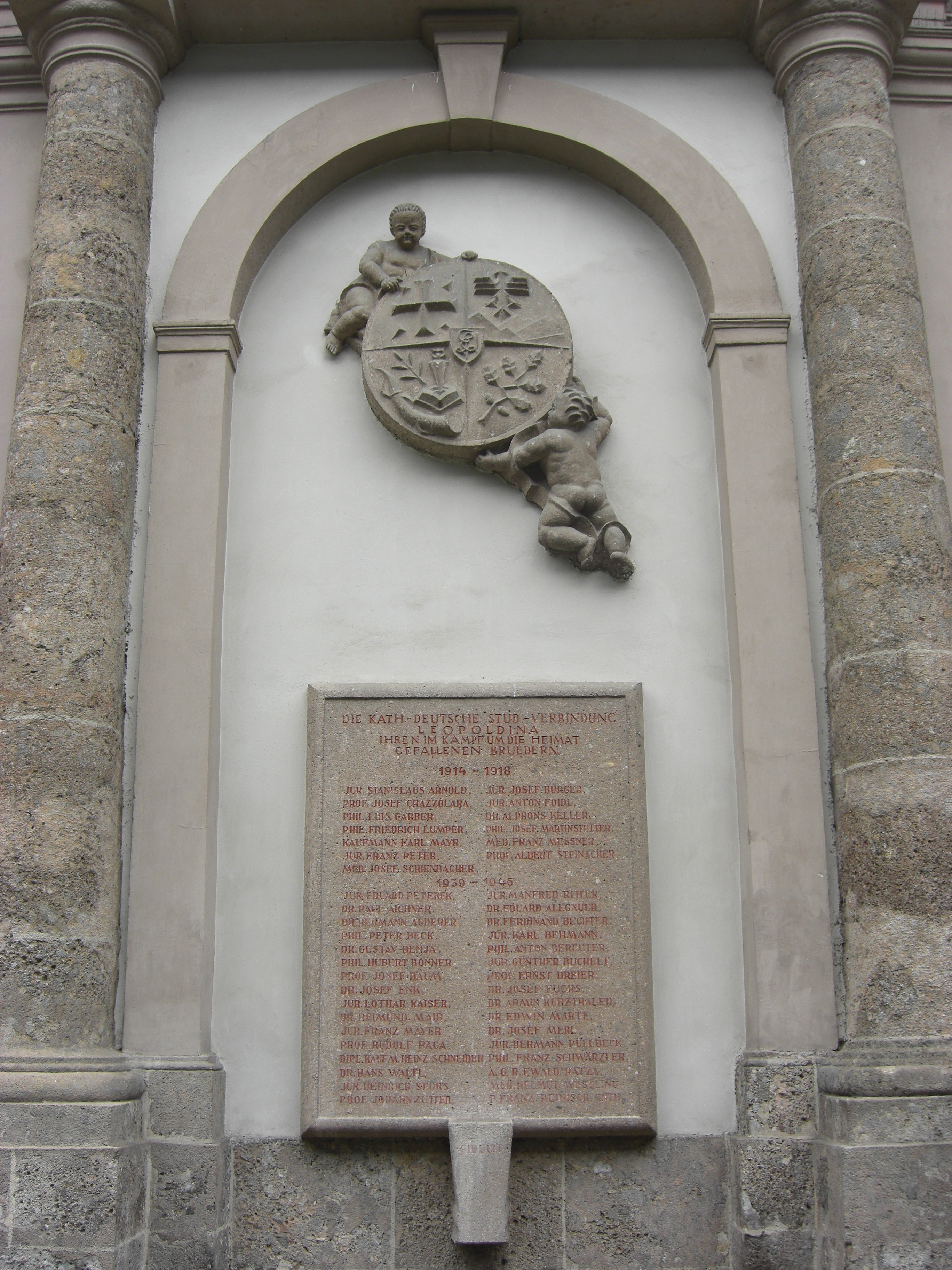 Denkmal für die in den beiden Weltkriegen gefallenen Mitglieder der K.Ö.H.V. Leopoldina Innsbruck an der Südseite der Johanneskirche (Innsbruck).